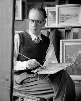 Pintor chileno, Premio Nacional de Arte 1967